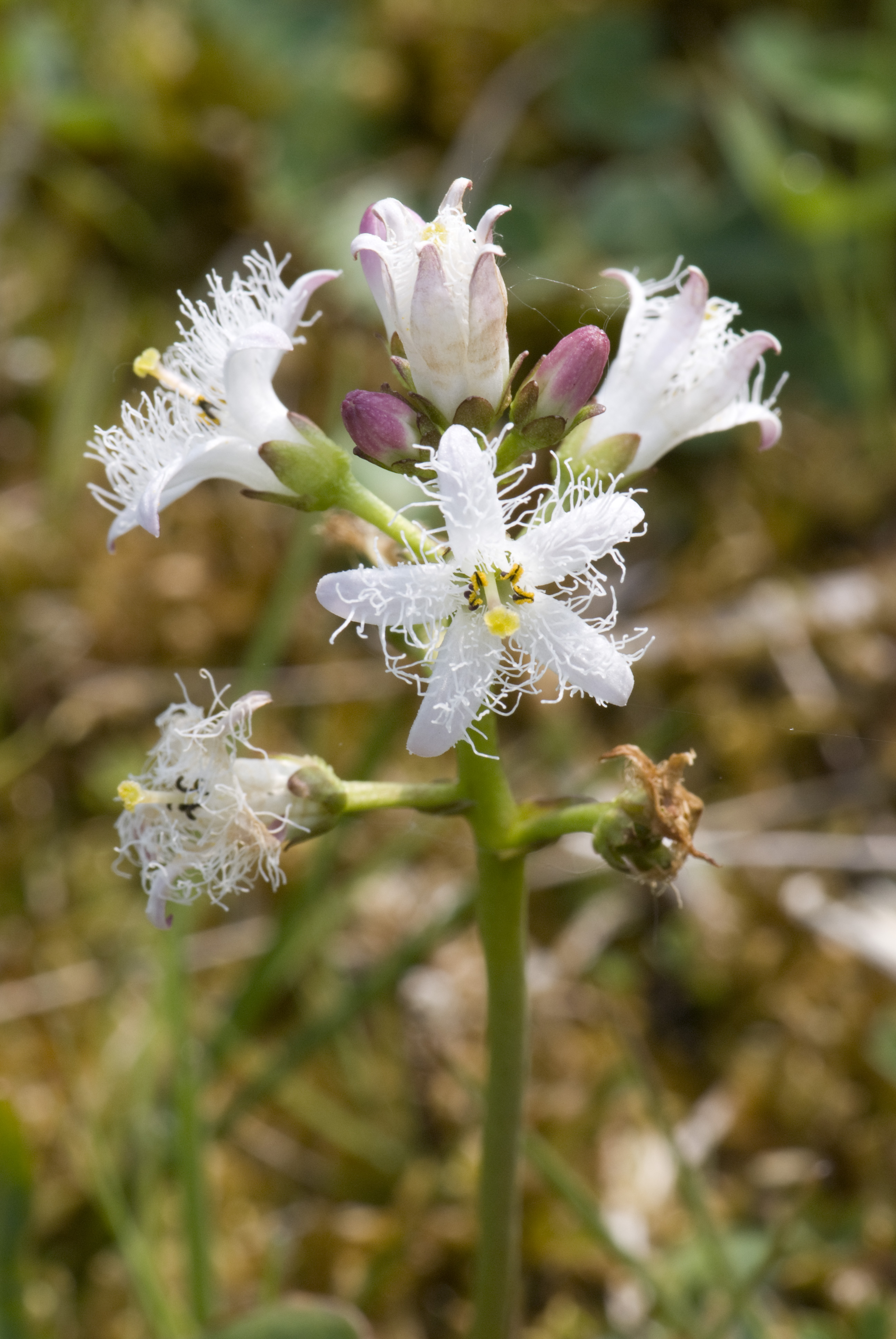 Menyanthes trifoliata Marais Etang le Maçon à Mareuil Caubert (Somme), France